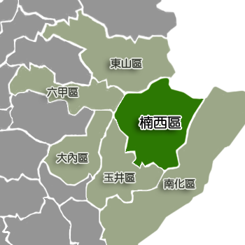 楠西區相對位置